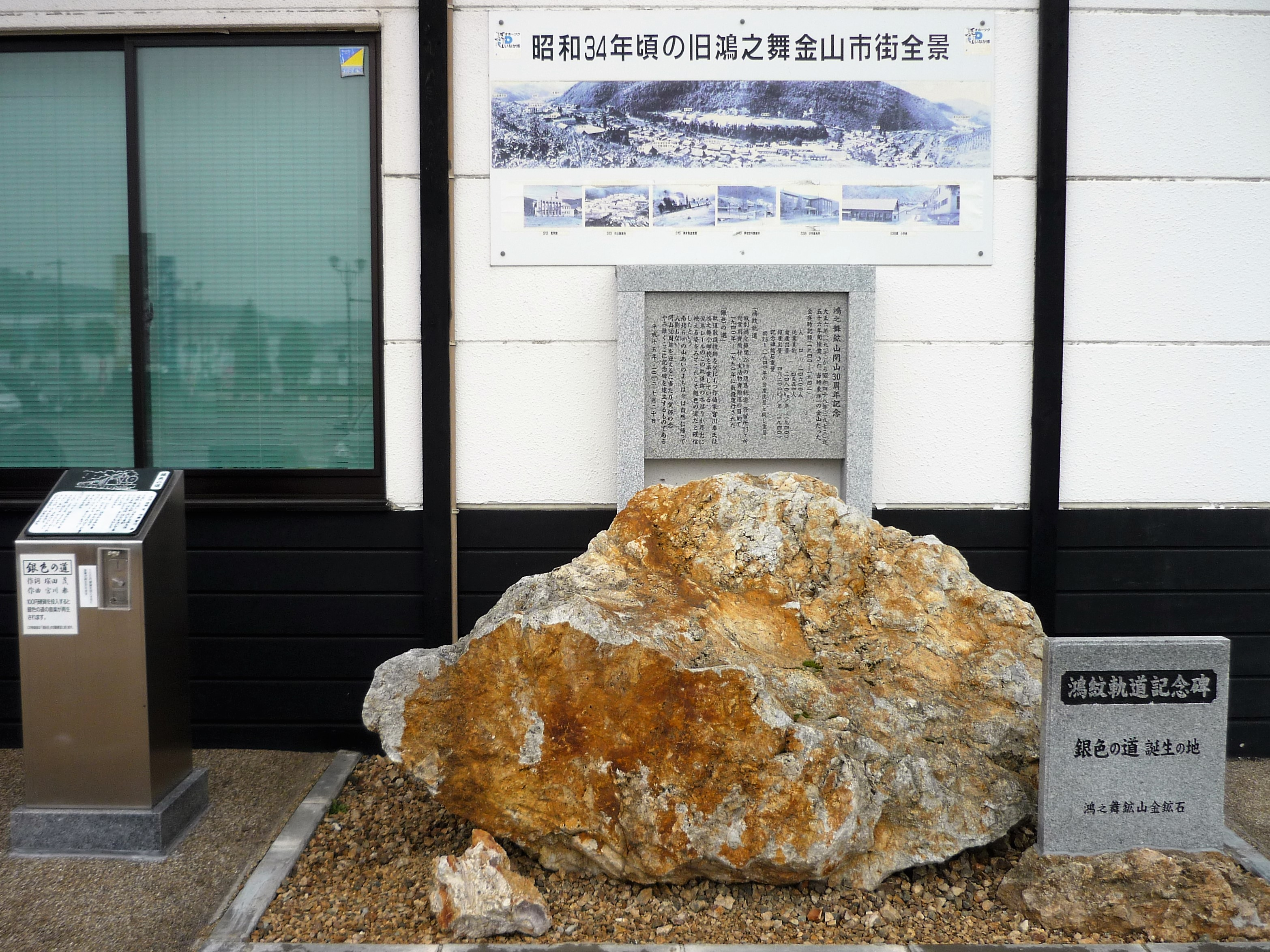 オホーツク氷紋の駅（紋別駅跡）にある鴻紋軌道記念碑